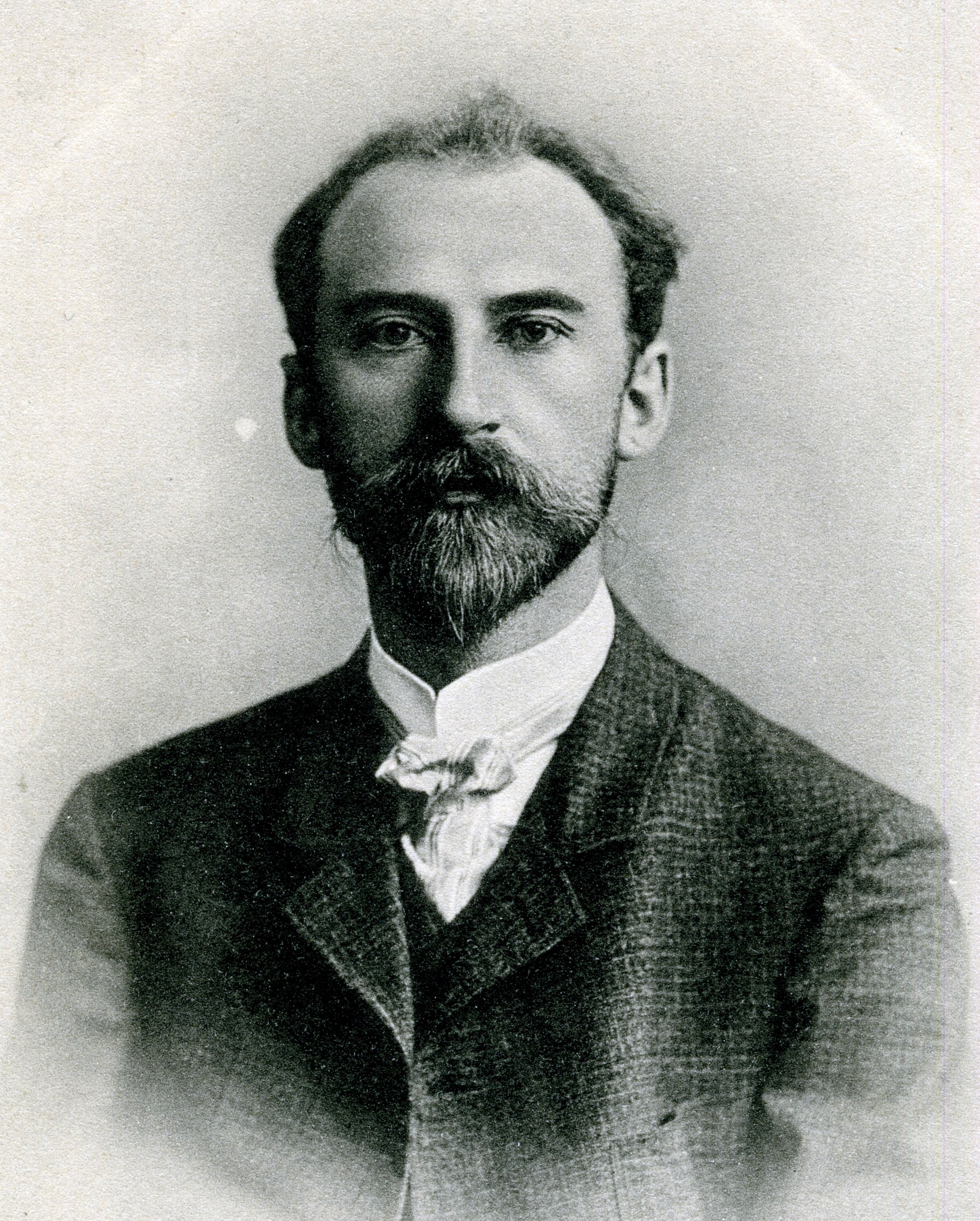 Ян Янович Теннисон